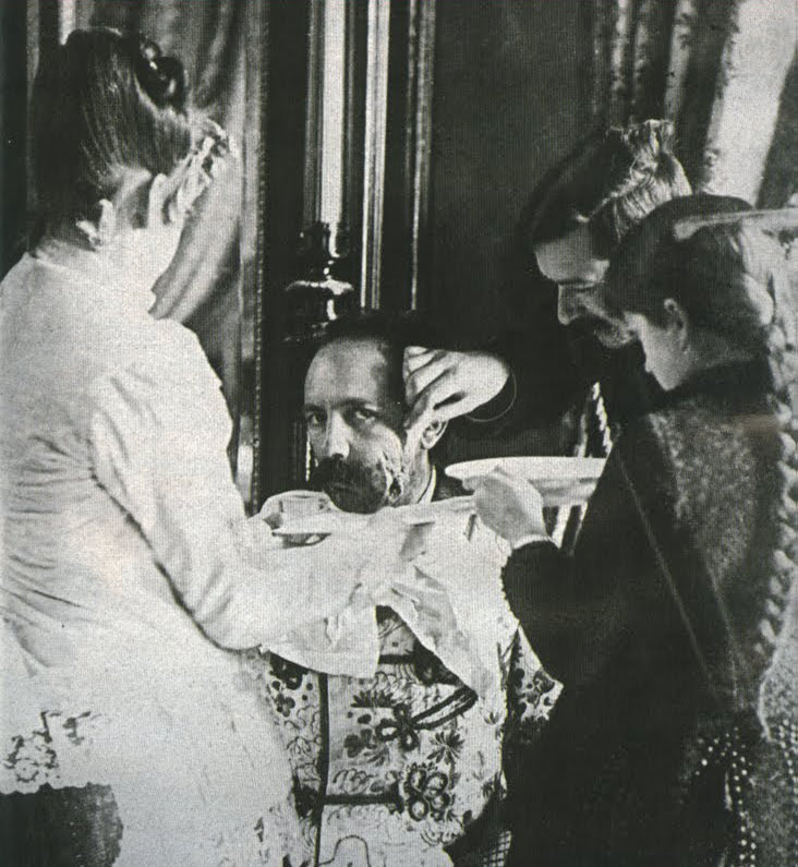 Primeras curaciones efectuadas a Máximo Santos luego del atentado perpetrado por Gregorio Ortiz